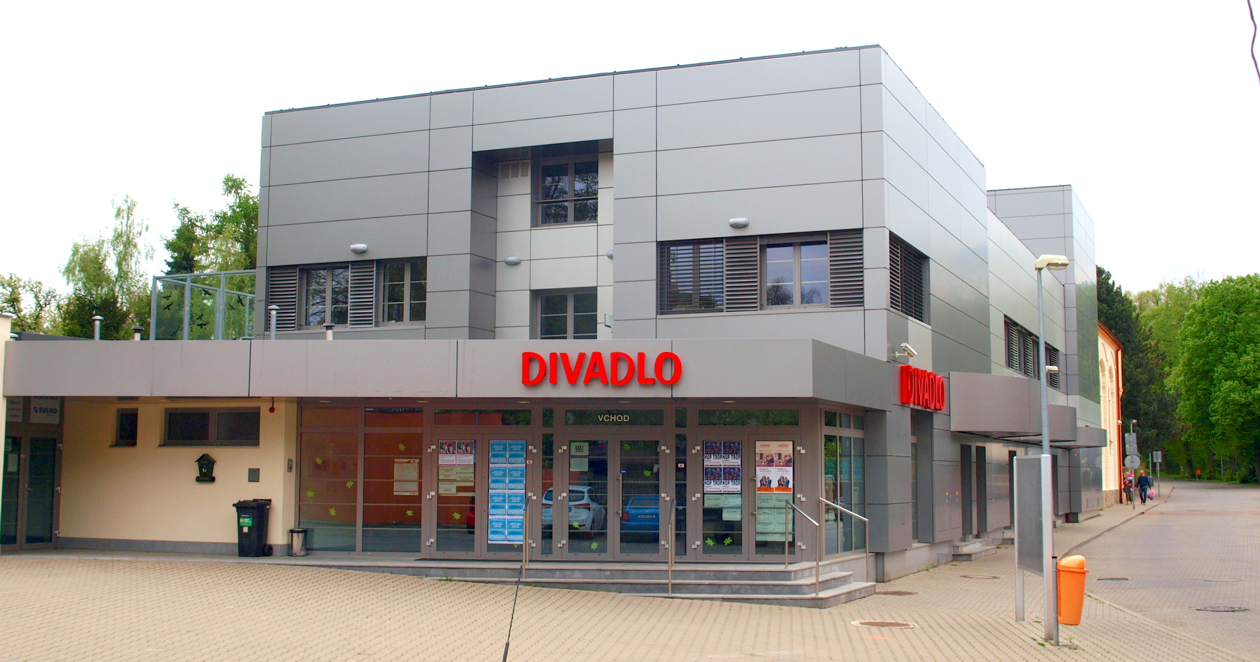 Divadlo v Uhříněvsi